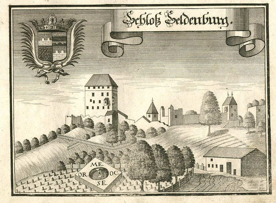 “Schloß Seldenburg” (Saldenburg), aus Beschreibung des Churfürsten- u. Hertzogthumbs Ober- und Nidern Bayrn. Rentamt Landshut. – Gericht Vilshofen, 1723